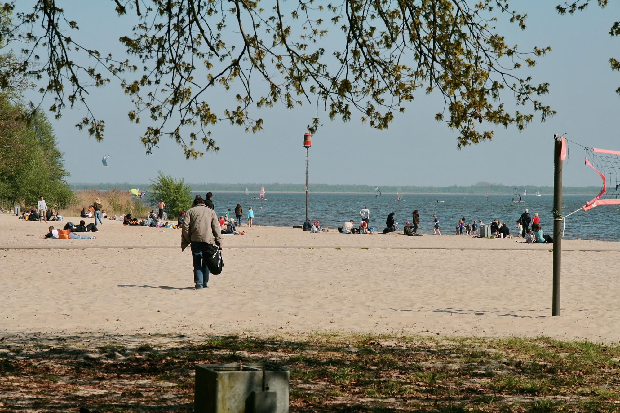 Steinhuder Meer bei Mardorf (Neustadt am Rübenberge), Niedersachsen, Deutschland)